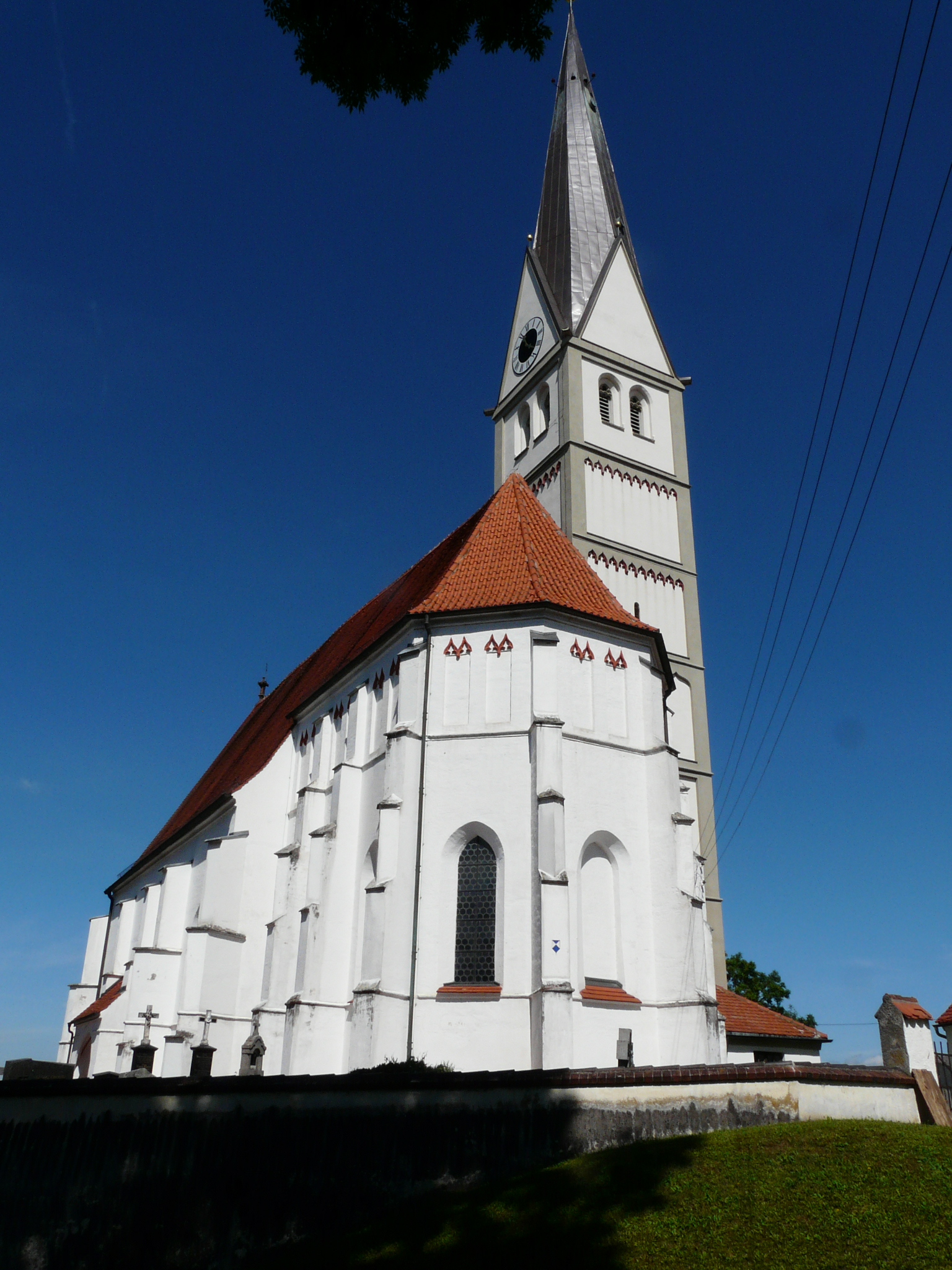 Kirche St. Johannis in Scheuring